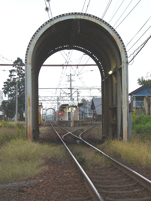 朝の福井鉄道浅水駅 駅の福井方からja:スノーシェルターとホームを望む